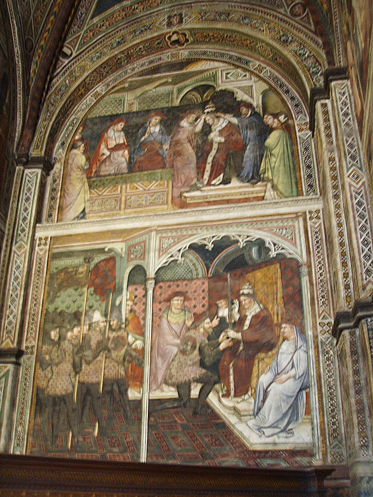 Spinello Aretino fresco, in Palazzo Pubblico, in Siena, Italy